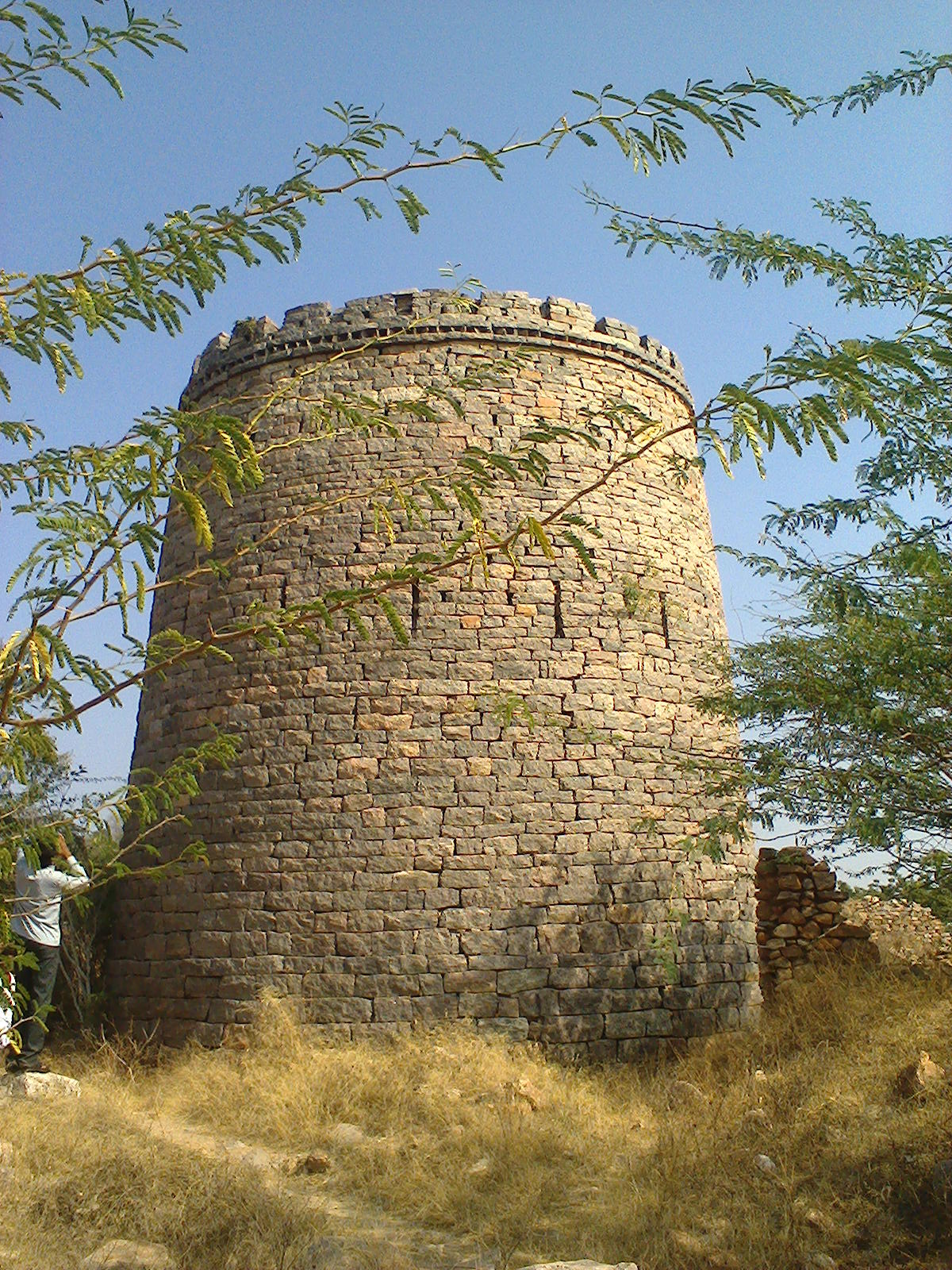 కోట బురుజు